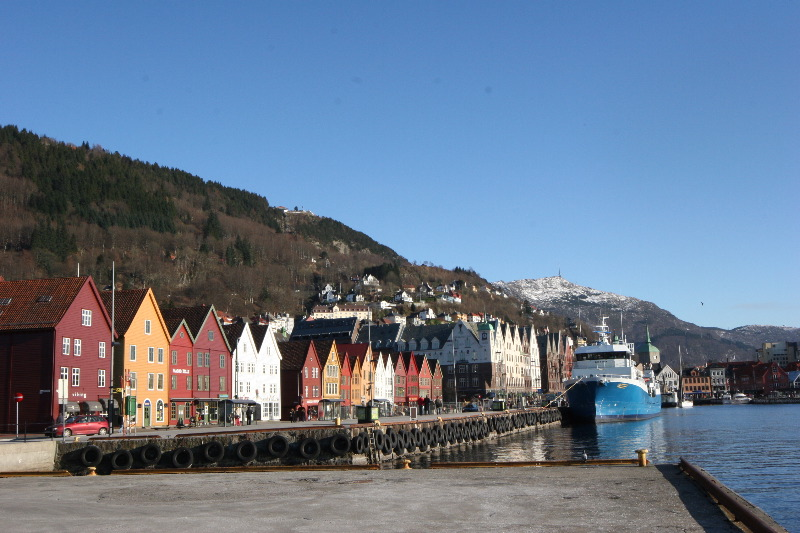 Bryggen, Bergen (Norway)